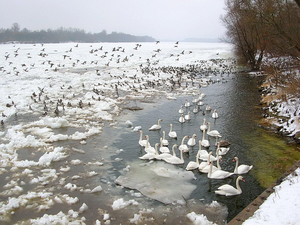 Wisła w Brdyujściu w Bydgoszczy. Zima.